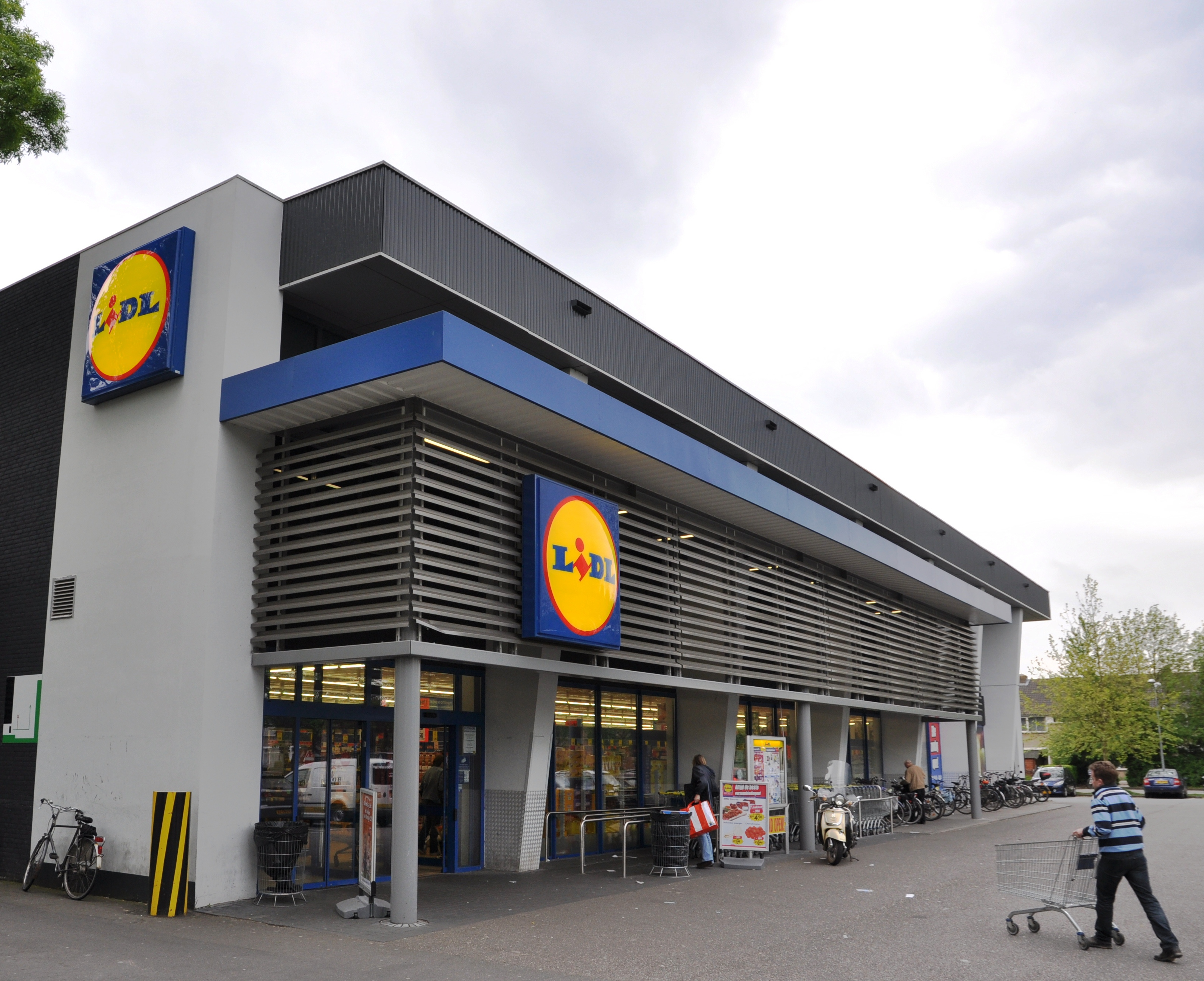 De Lidl in Woerden is gevestigd in een voormalige sporthal.